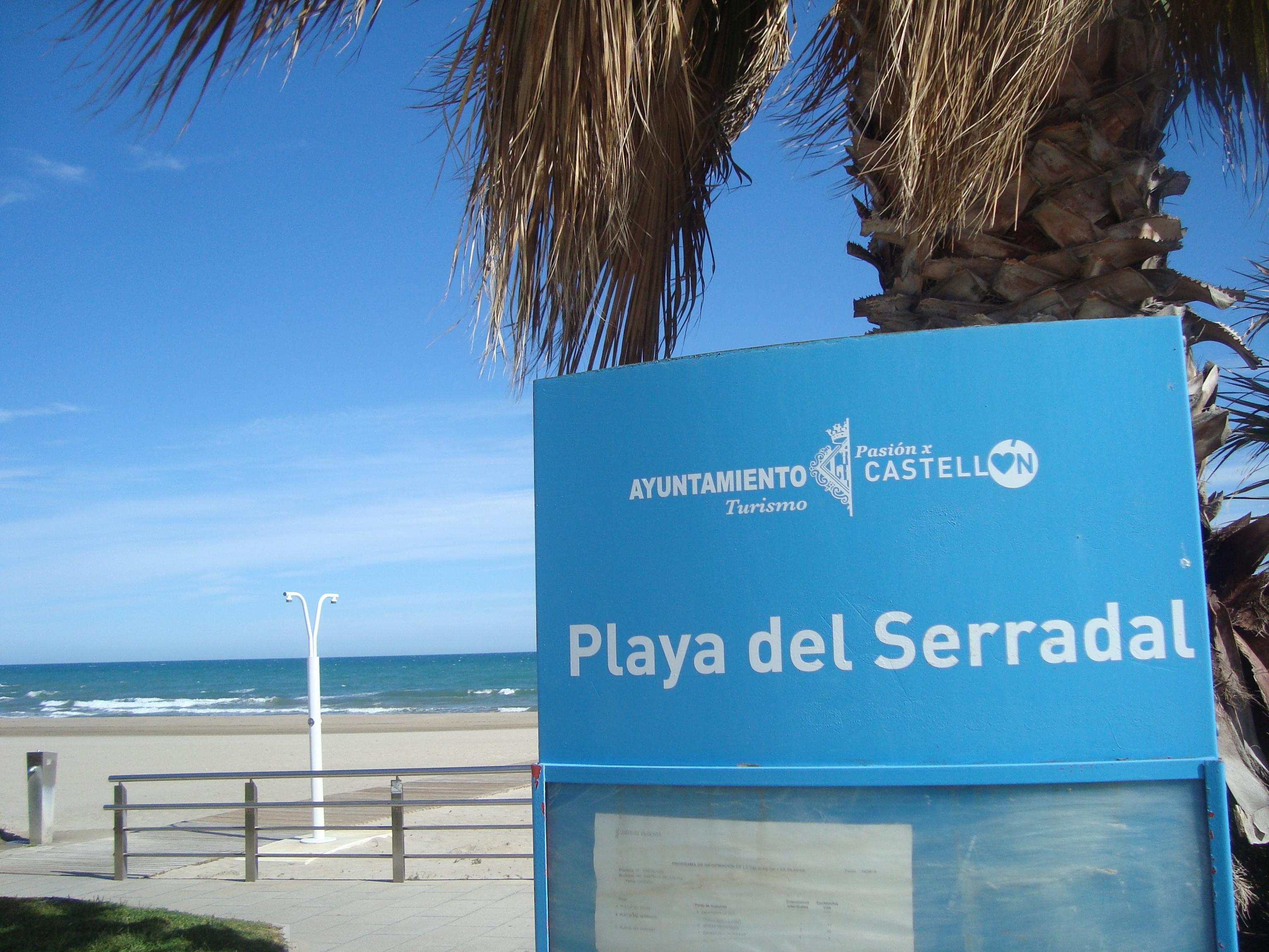 Platja del Serradal (Castelló de la Plana) This is a a photo of a beach in the Land of Valencia, Spain, with id: PL-1436